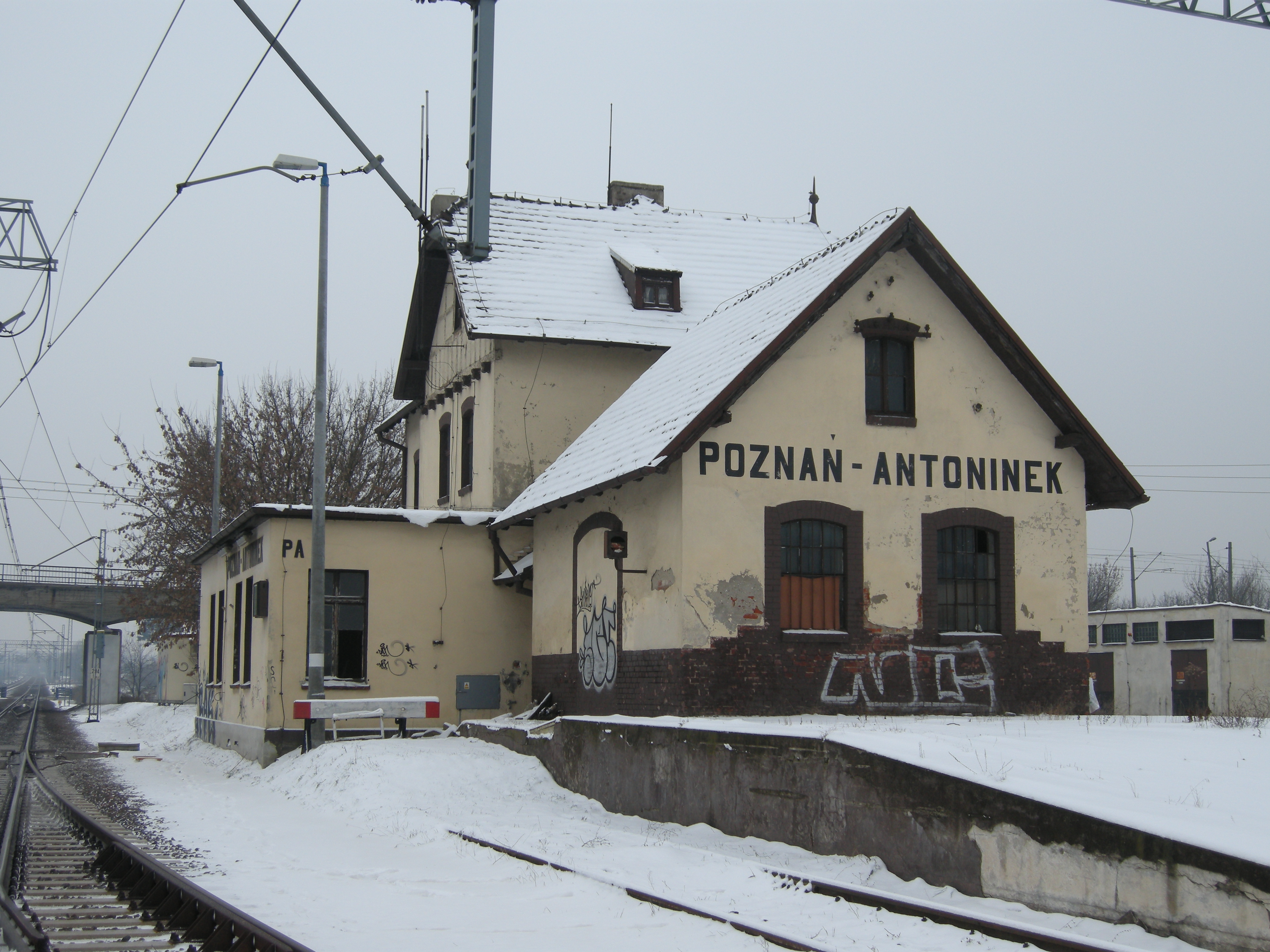 Stacja kolejowa przystanek Poznań Antoninek